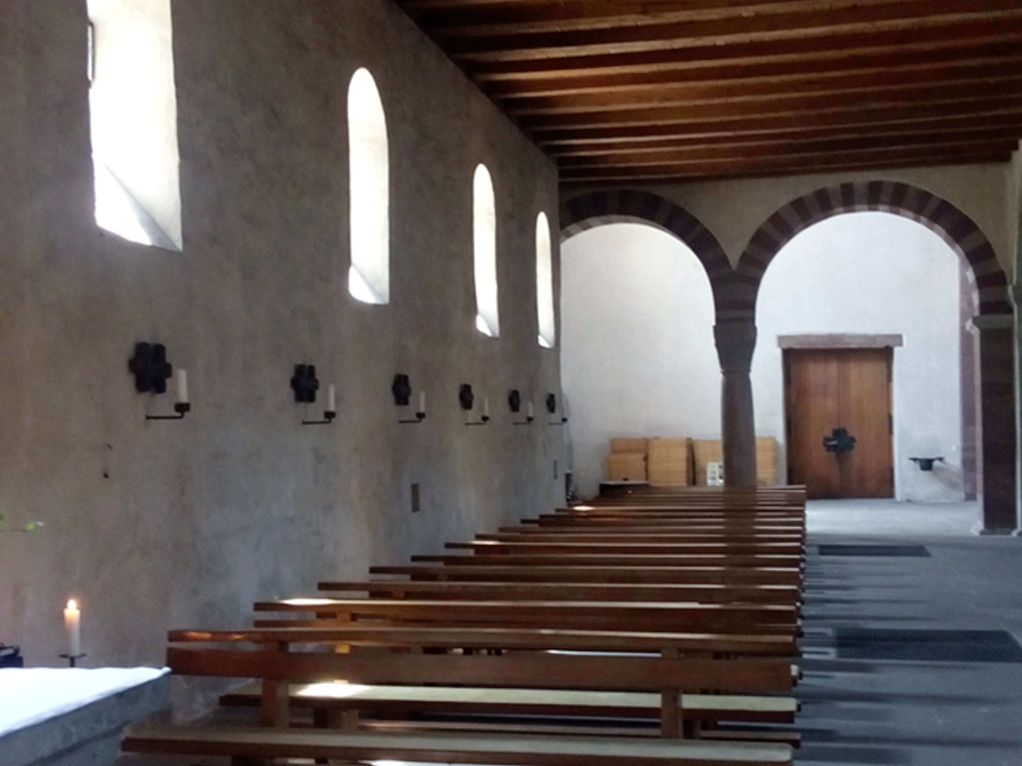 Südliches Seitenschiff Richtung Westen